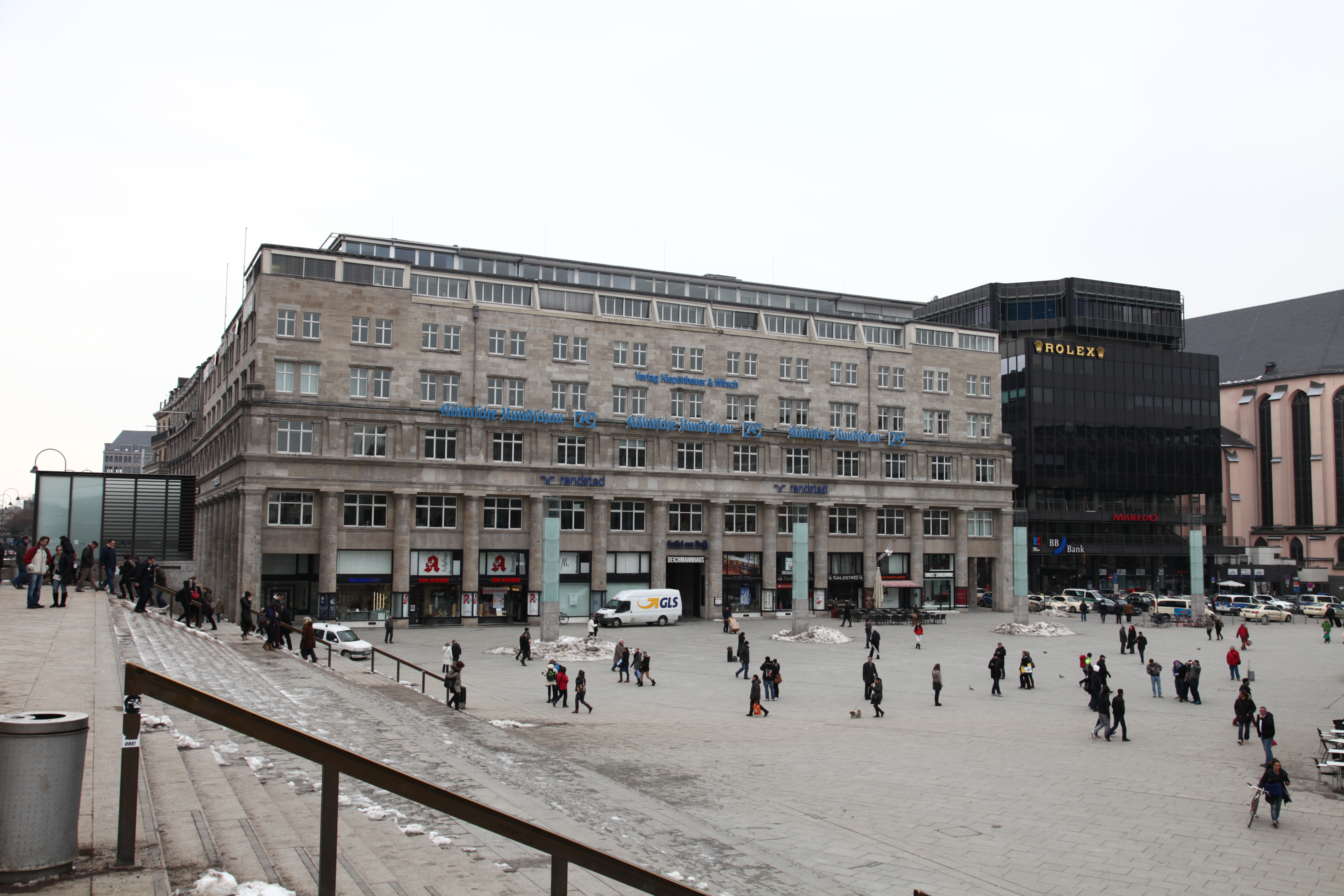 Gebäude des Verlages Kiepenheuer und Witsch